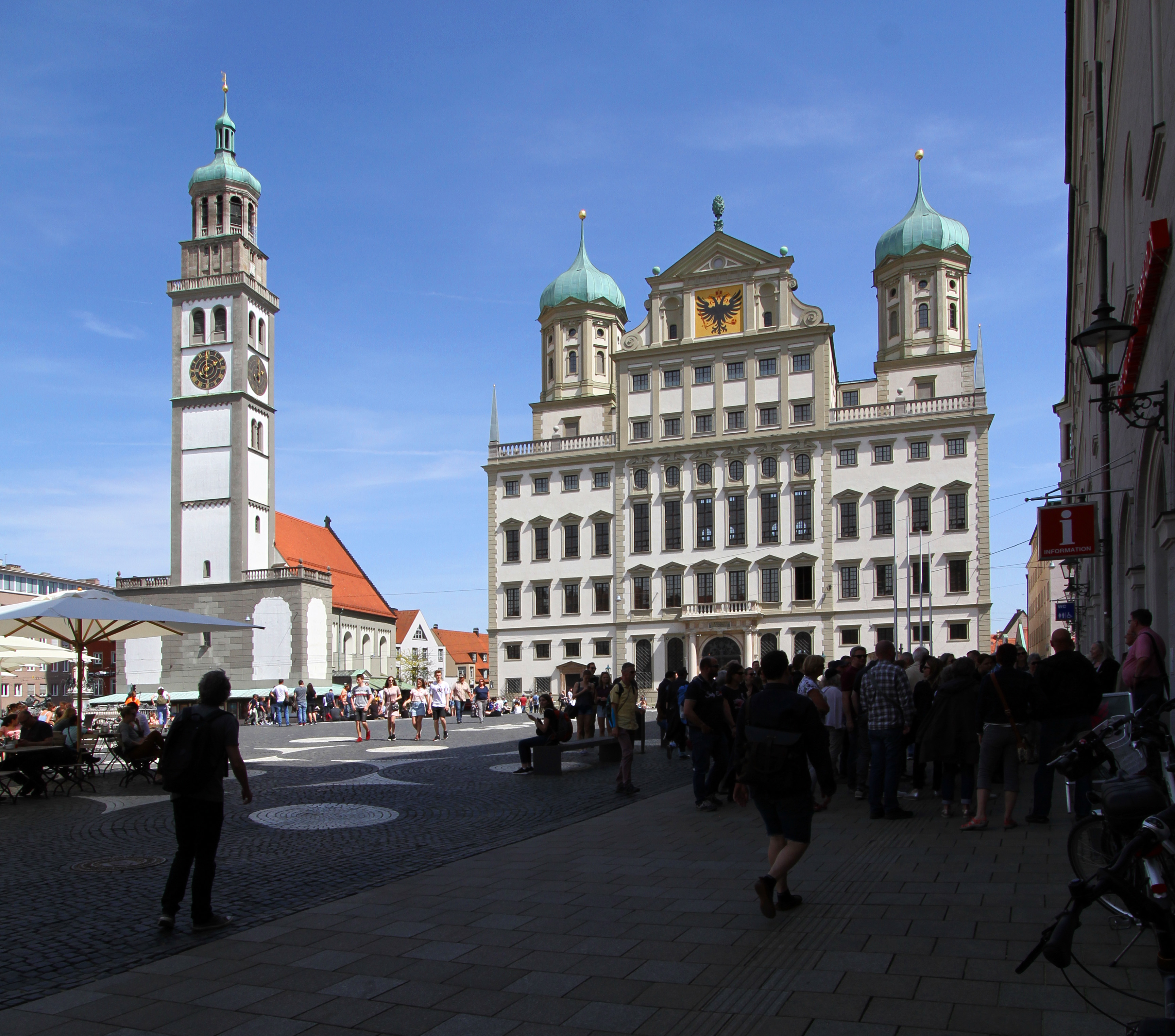 Perlachturm und Rathaus in Augsburg